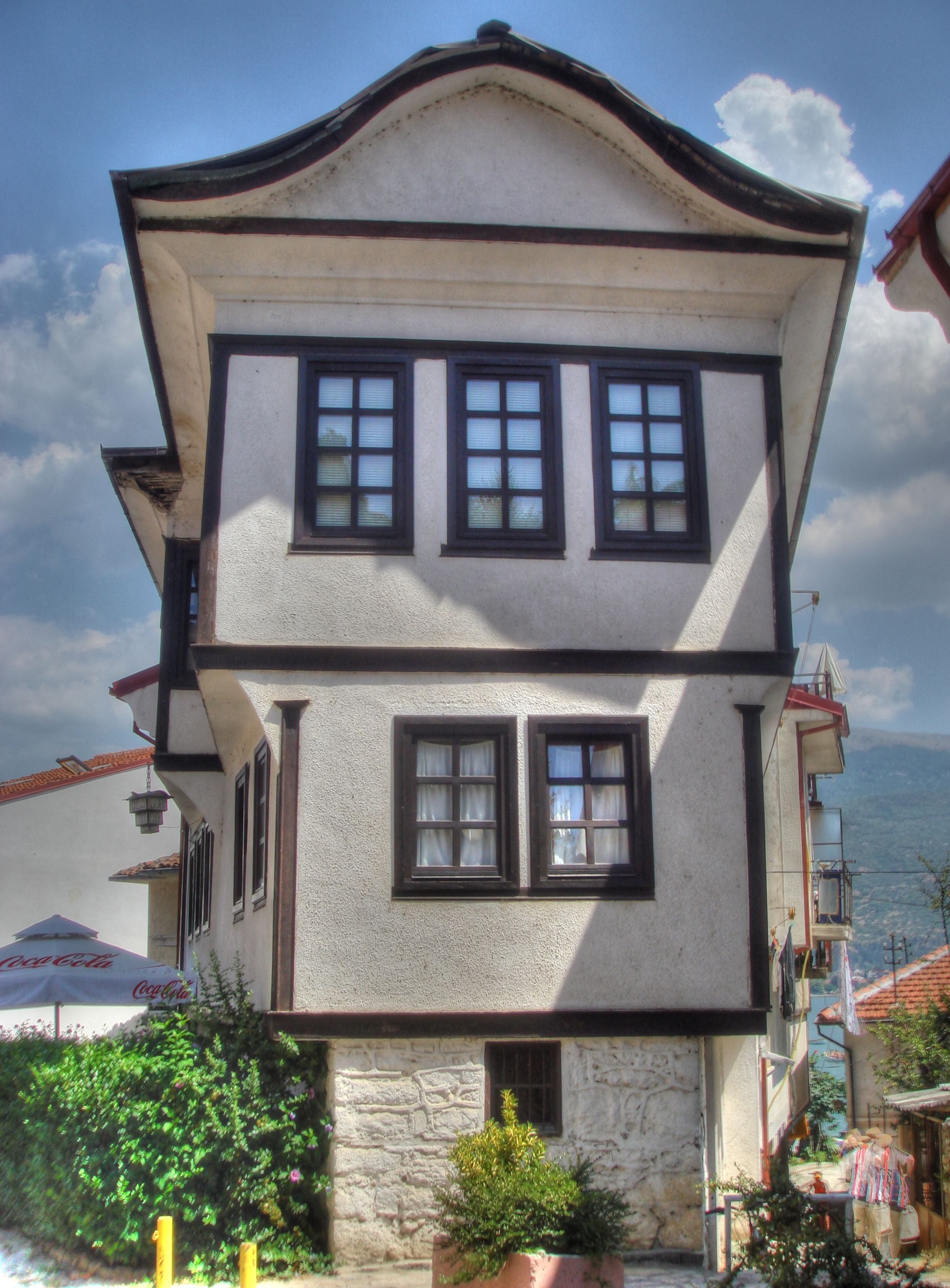 Къщата на Робевци в Охрид, Република Македония